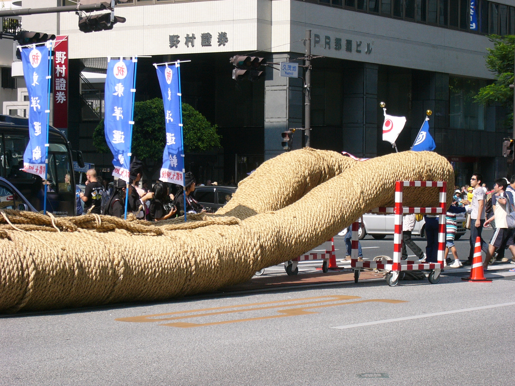 Naha Matsuri Giant tug rope (West side part)